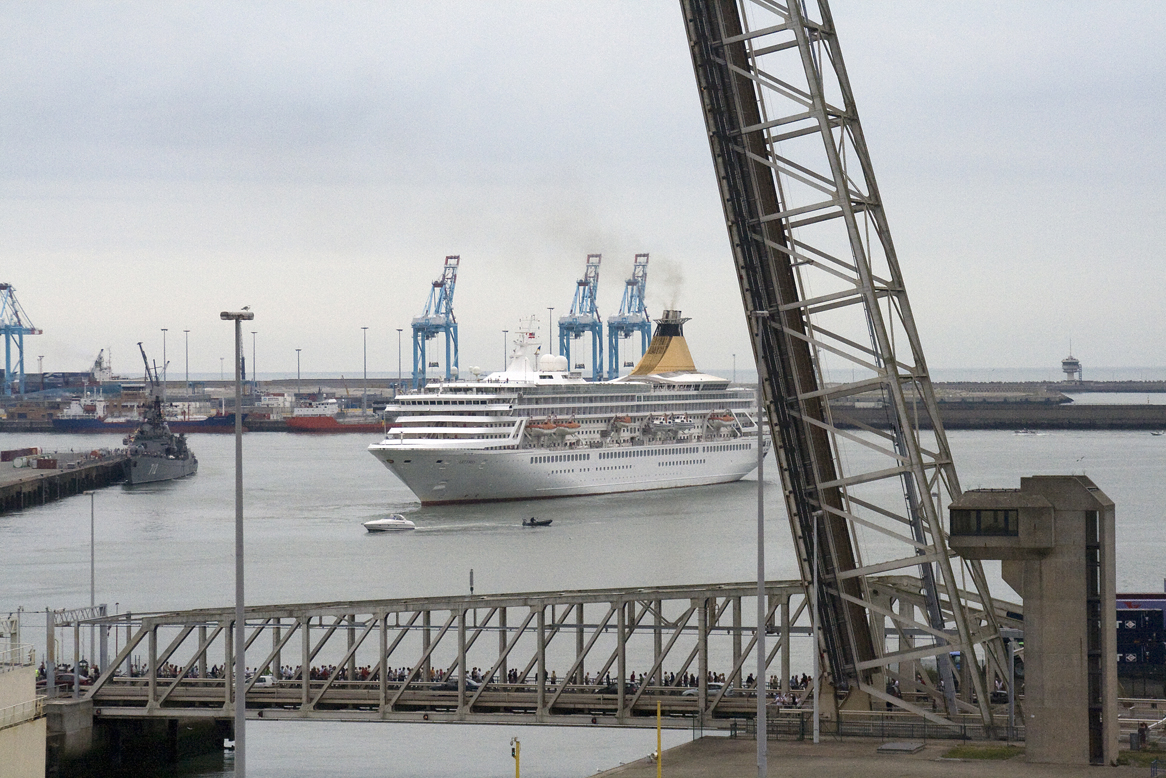 Cruiseschip MS Artemis verlaat de haven